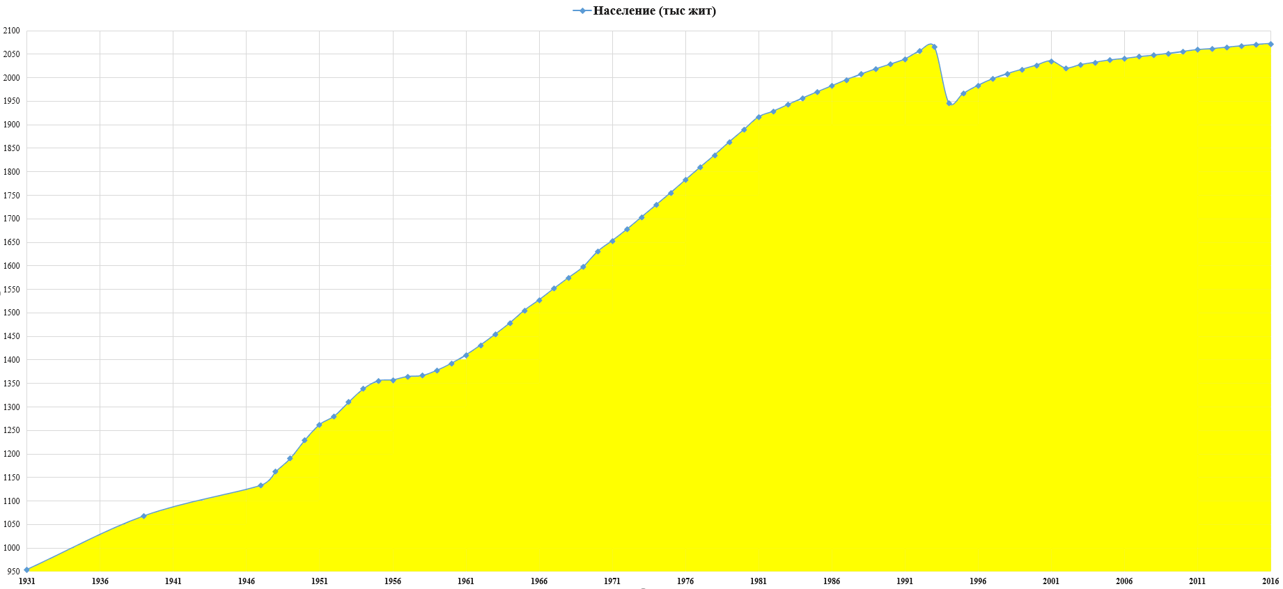 Население Македонии